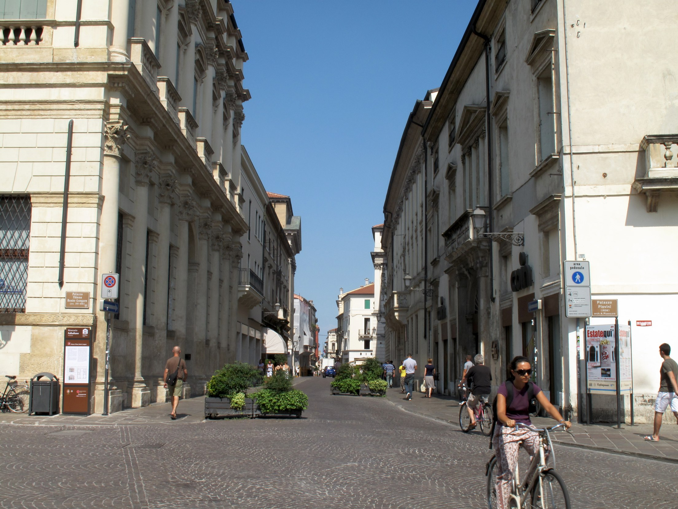 Vicenza 24